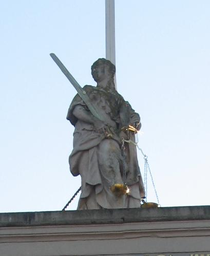 "De Gerechtigheid" op het Stadhuis in Wageningen